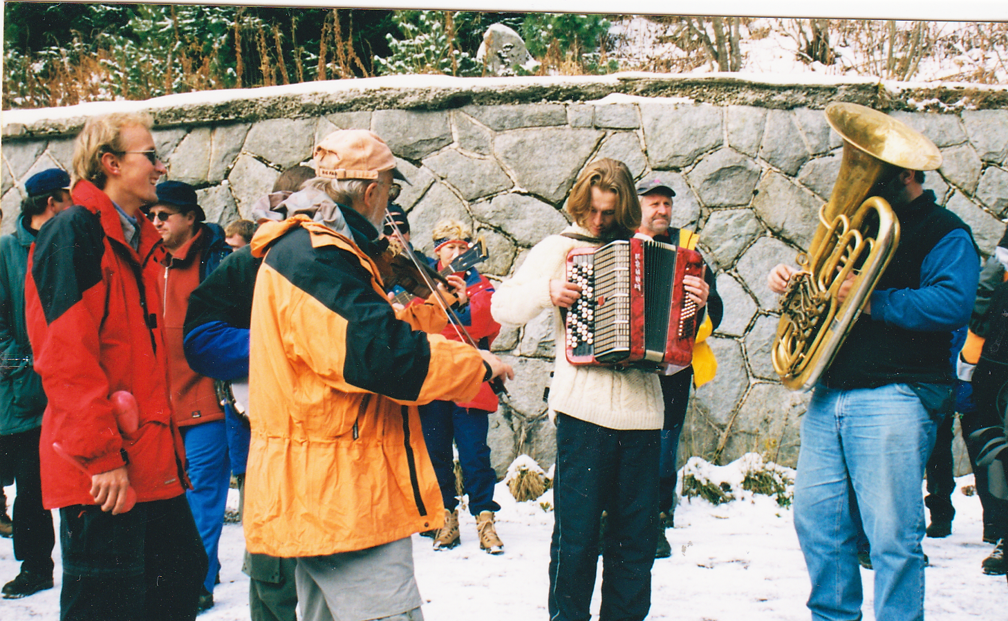 Horská kapela Sherpa band na Popradskom plese vo Vysokých Tatrách v septembri 2002 zabávala divákov i nosičov počas súťaže horských nosičov Sherpa rallye